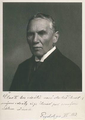 František Krejčí (1858–1934) - filozof a psycholog